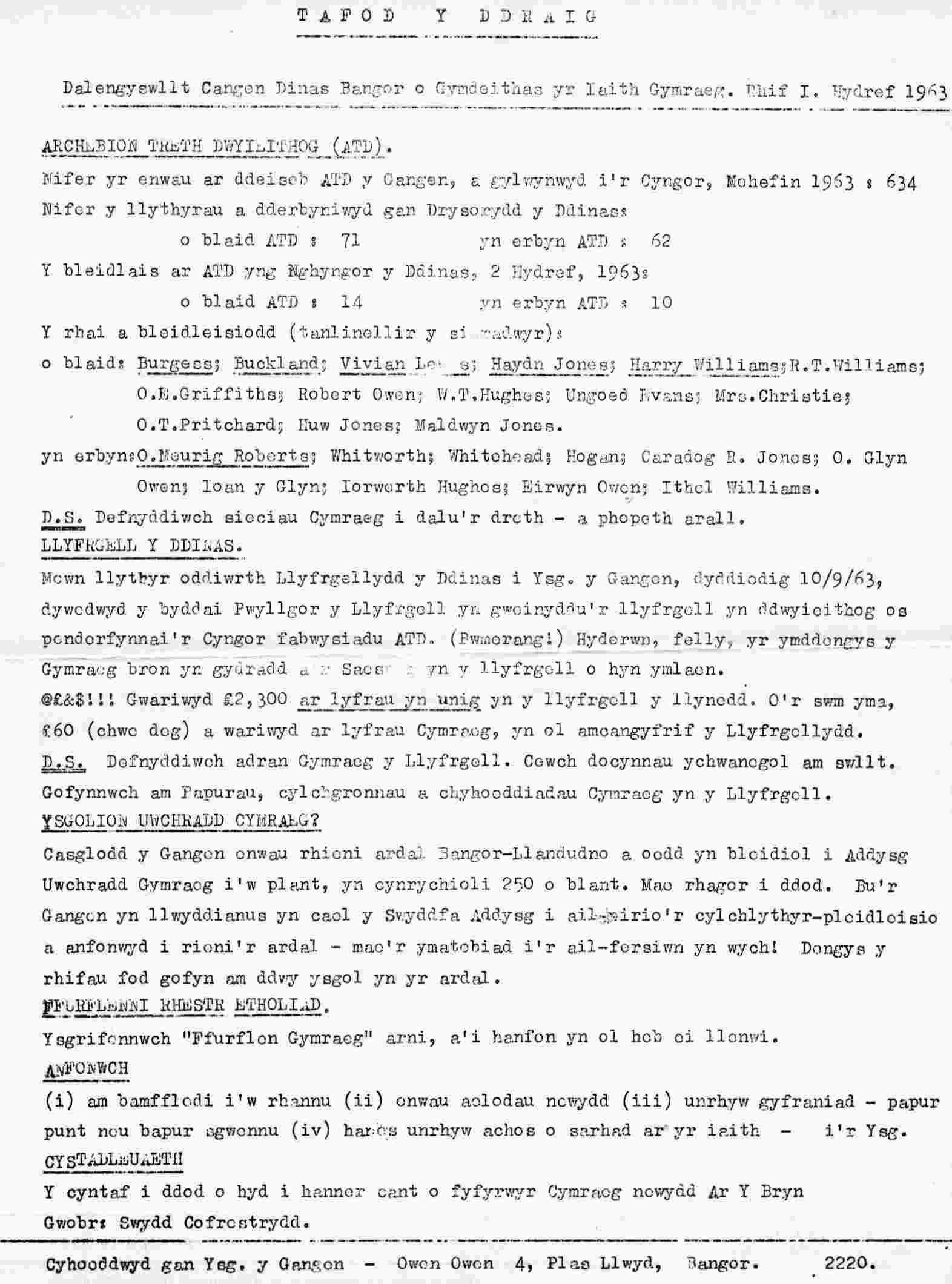 Tafod y Ddraig Rhif 1; Hydref 1963. Golygydd: Owain Owain